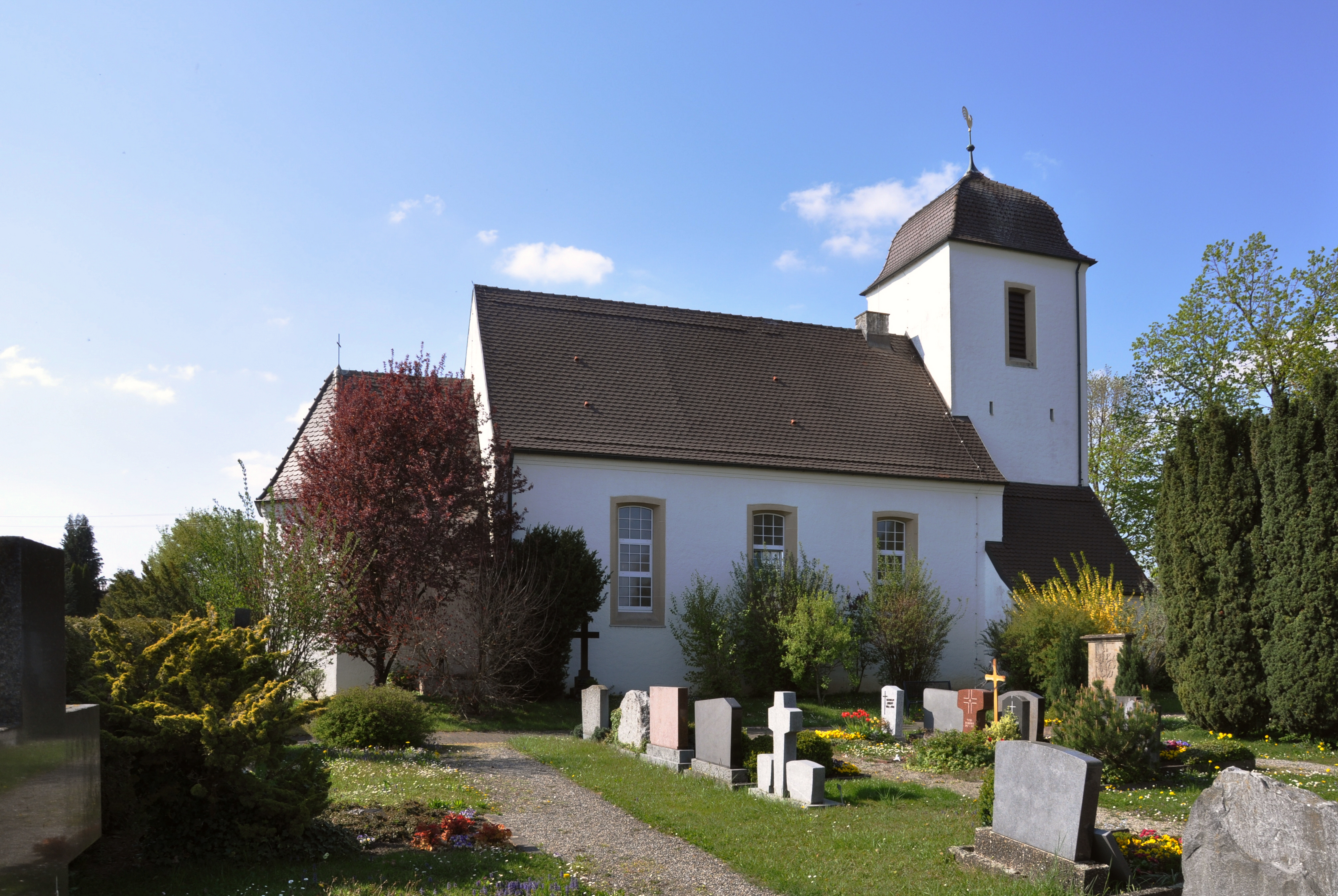 Evangelischer Friedhof Bavendorf (Ortschaft Taldorf, Stadt Ravensburg) mit der evangelischen Kirche